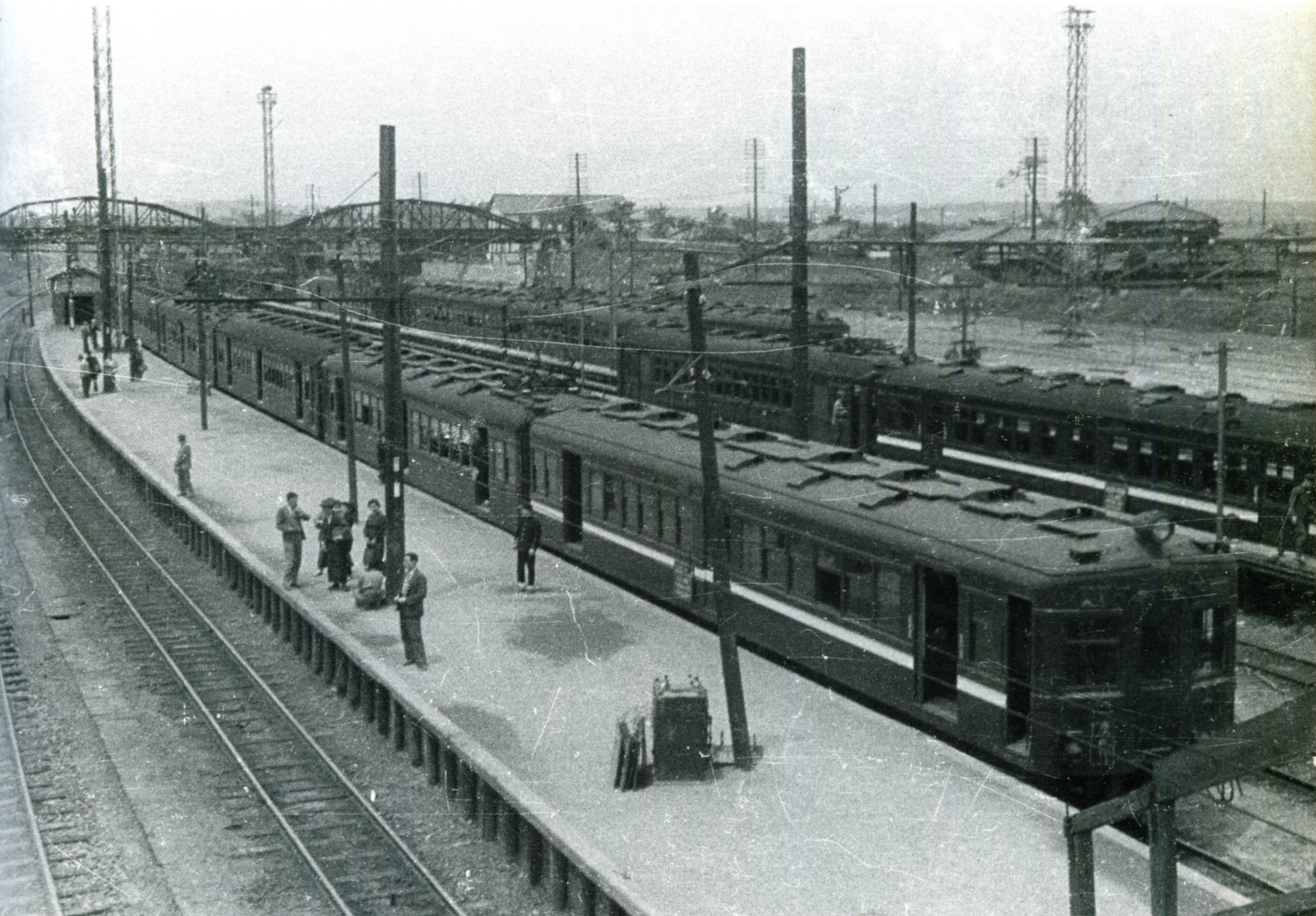 明石駅に停車中のクハ55104＋51050＋55149＋51054＋48033＋51046の京都行き6両編成。手前の白帯は進駐軍専用車。島式ホーム1面2線しか無く国電は当駅が終点で、西に向かう列車に乗る事は出来なかった。